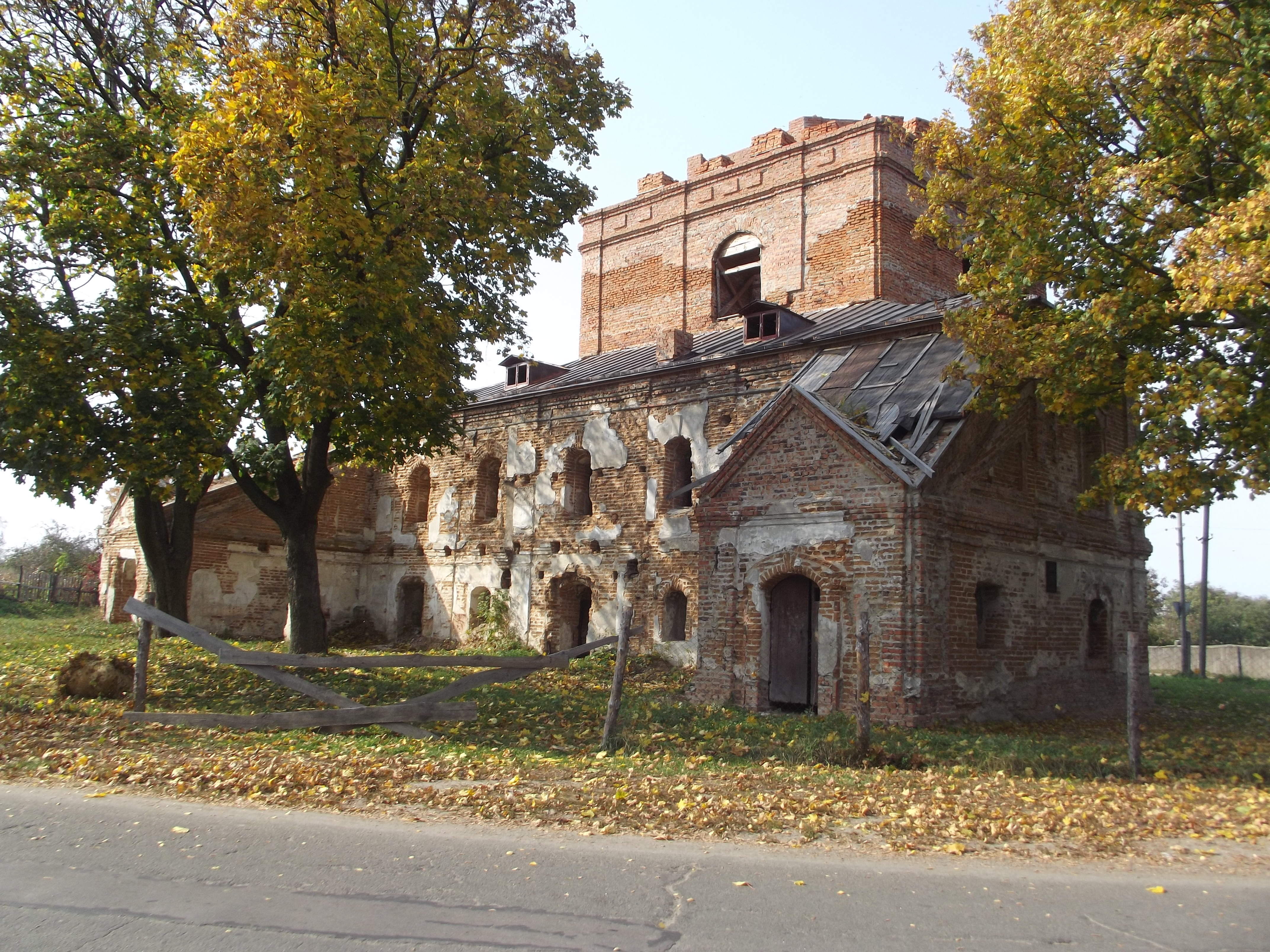 Іллінська церква (мур.), Короп